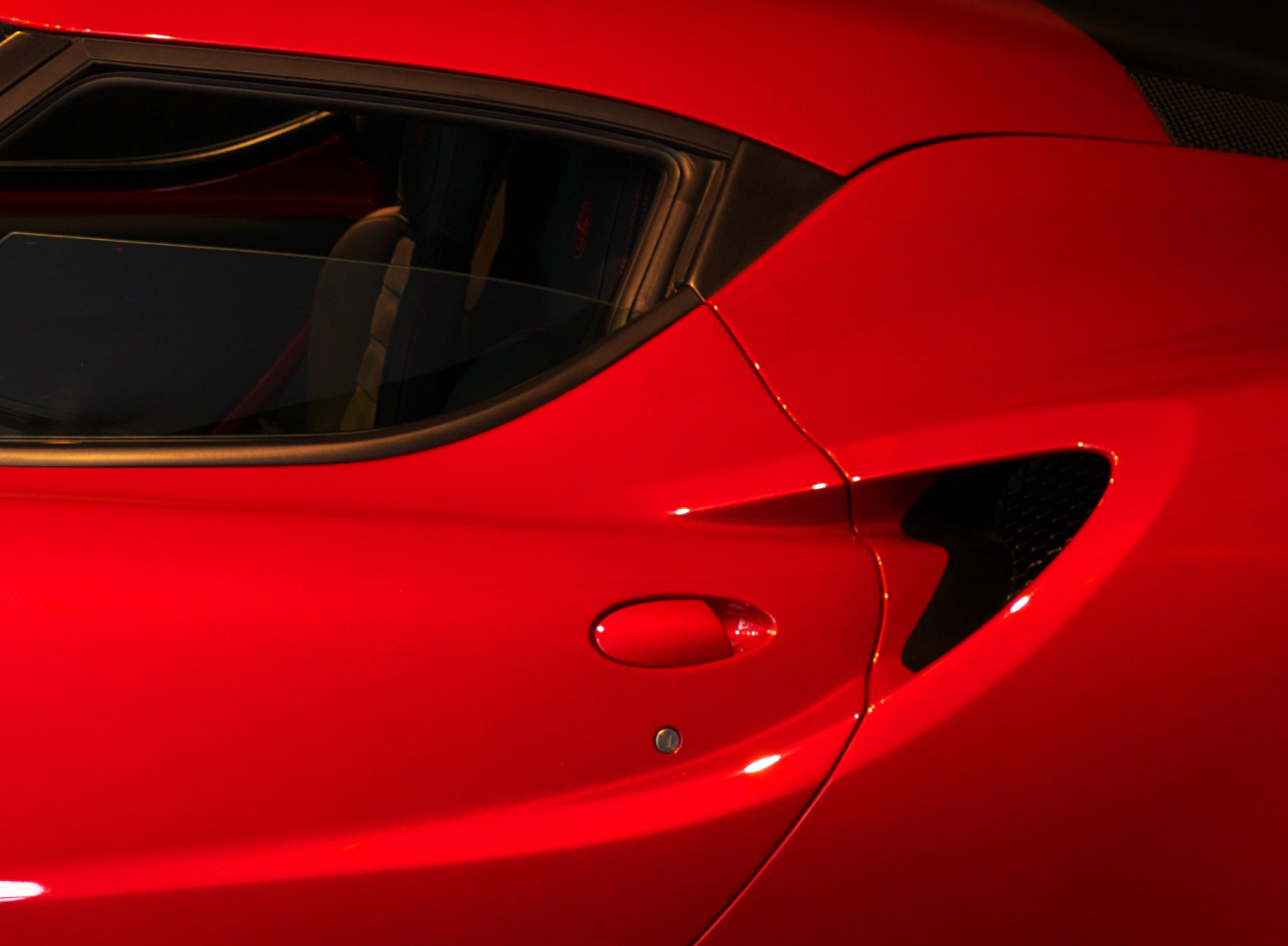 presa d'aria motore e maniglia della 4C